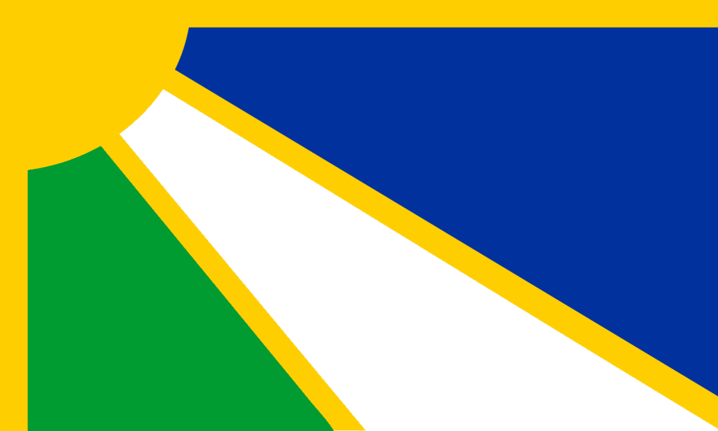 Provincia de Bolívar, La Libertad, Perú